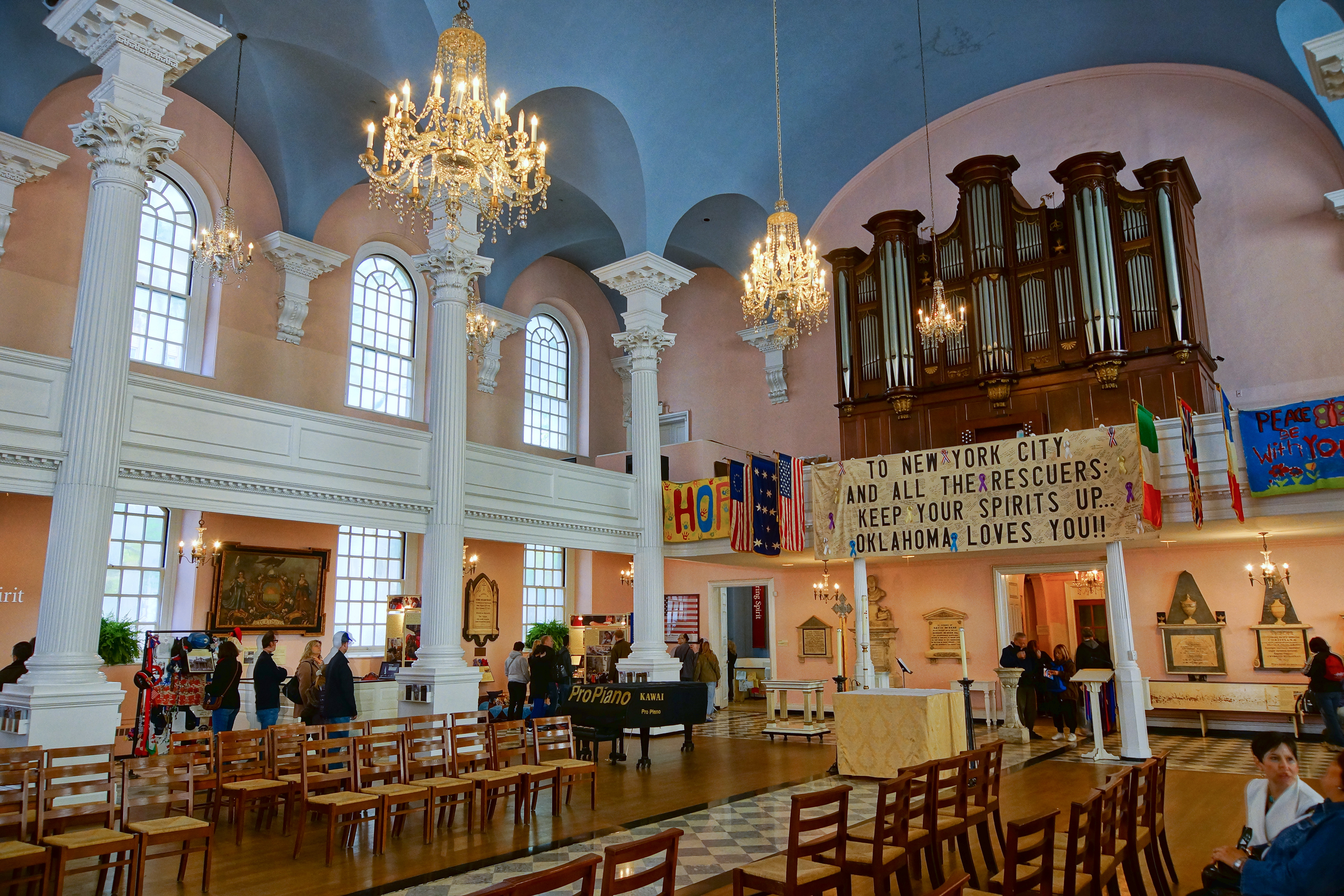 NYC - St Paul Chapel - Interieur vers l'orgue